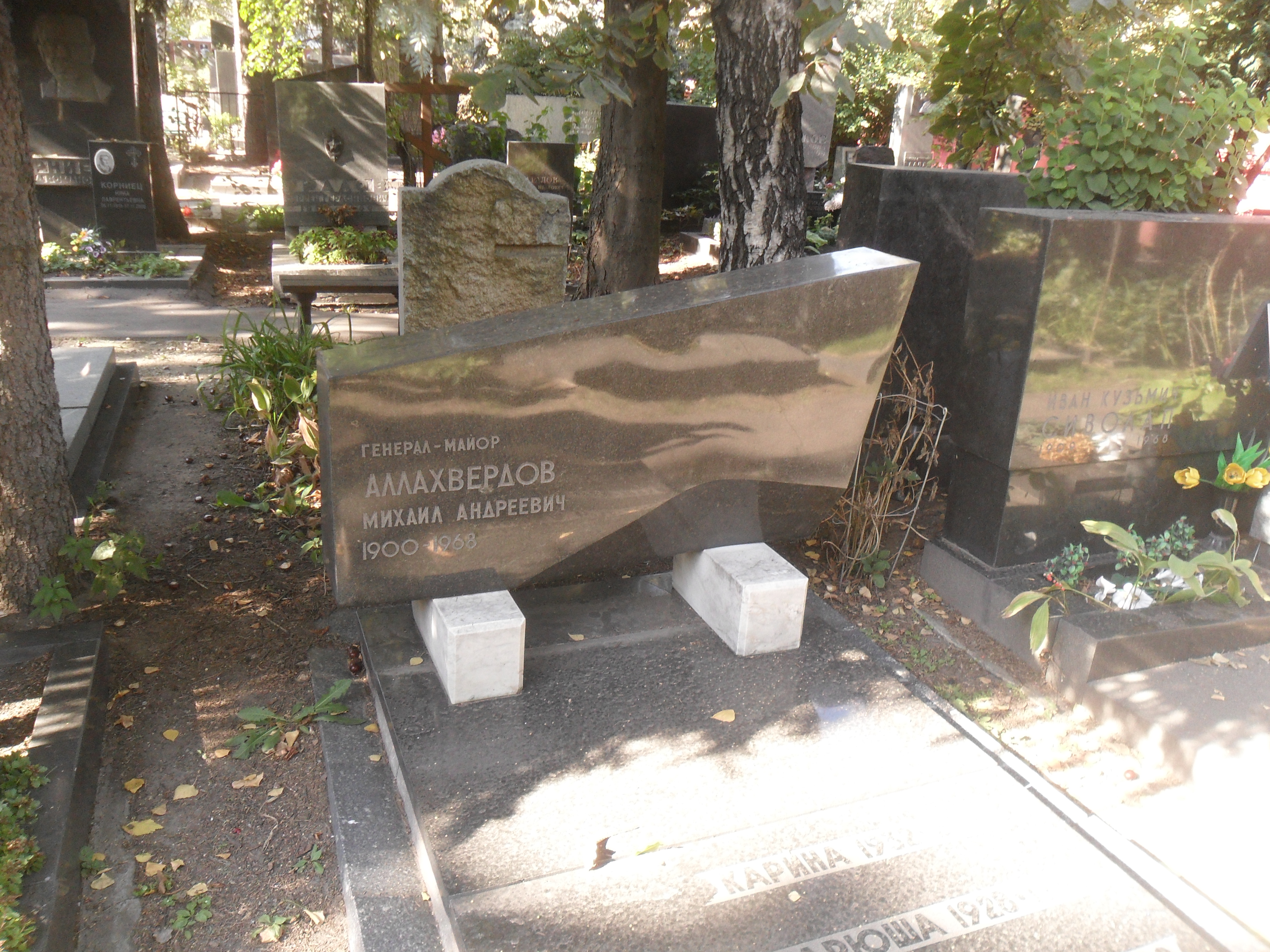 Могила генерал-майора Михаила Аллахвердова на Новодевичьем кладбище Москвы.